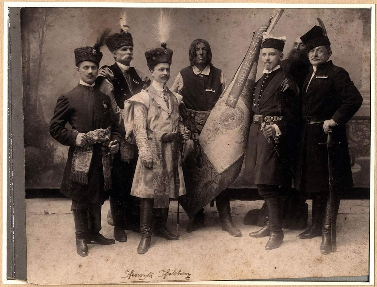 Беларуская (тарашкевіца): Удзельнікі нацыянальна-вызвольнага паўстаньня: Сымон Шыдлоўскі (Symon Šydłoŭski) трымае харугву Віцебшчыны (Viciebsk) з Пагоняй (Pahonia)